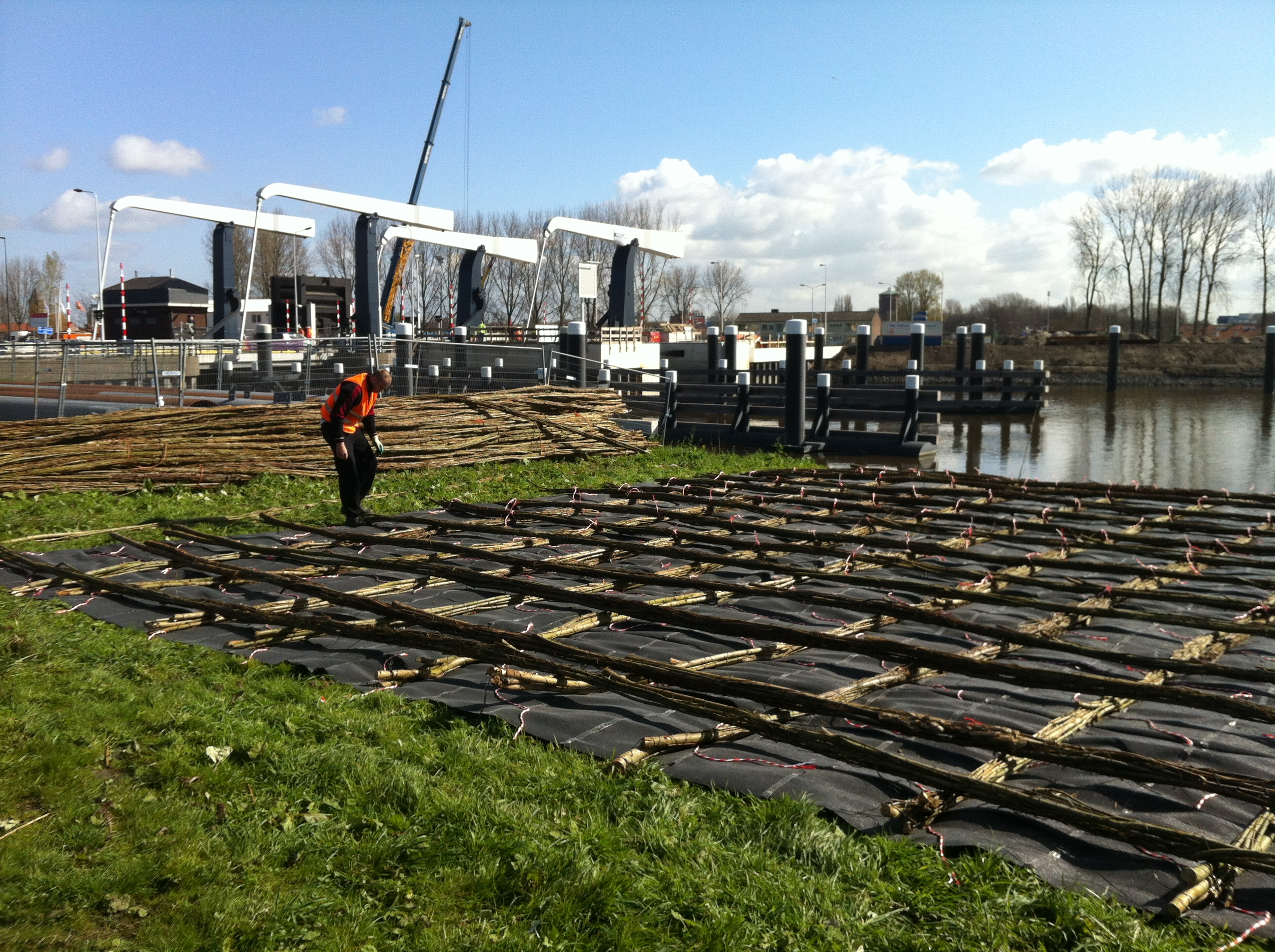 Zinkstuk voor de Hollandse IJssel bij de nieuwe Julianasluis in Gouda.